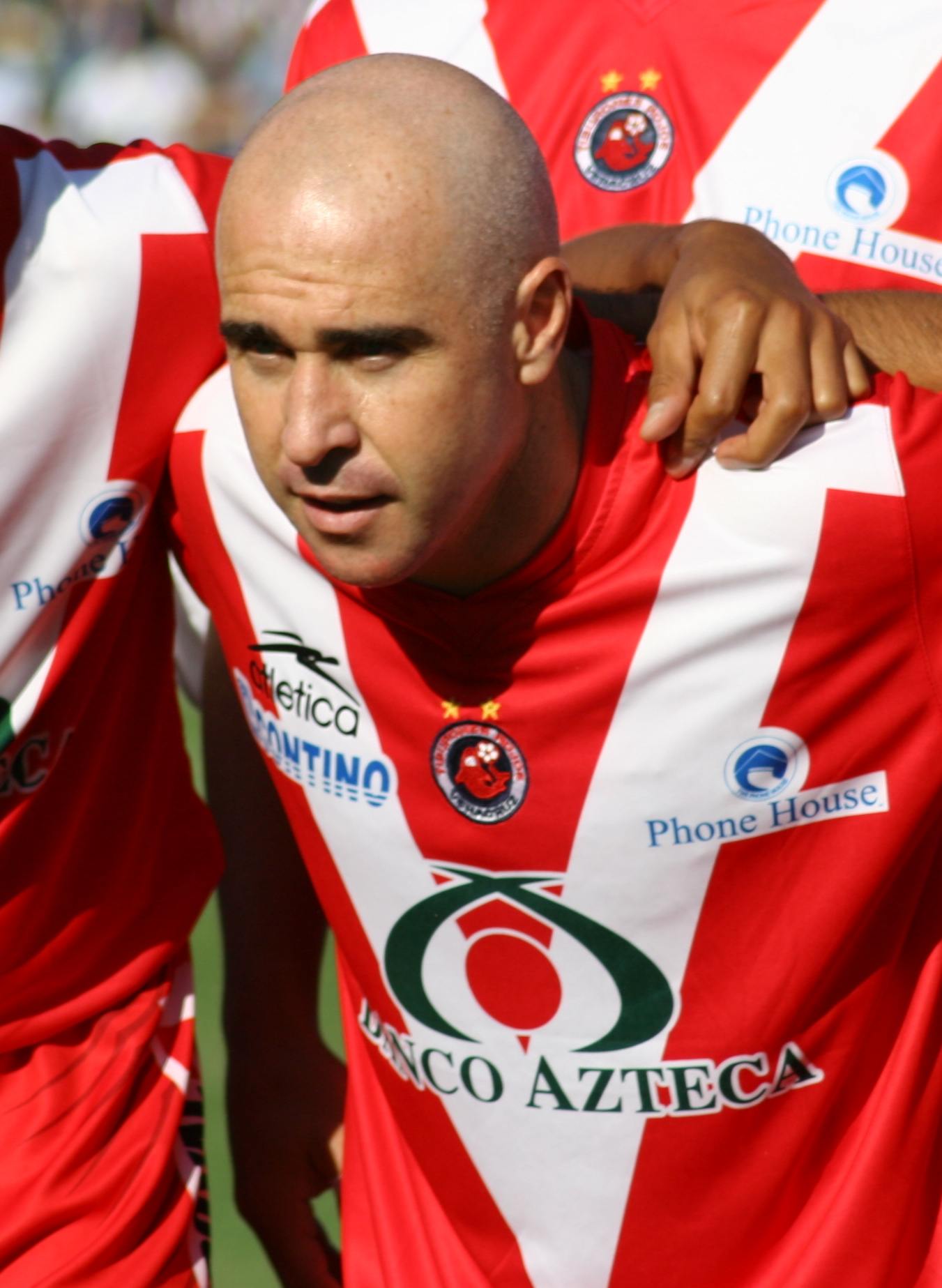 Rodrigo "El Pony" Ruiz, jugador de fútbol chileno nacionalizado mexicano.